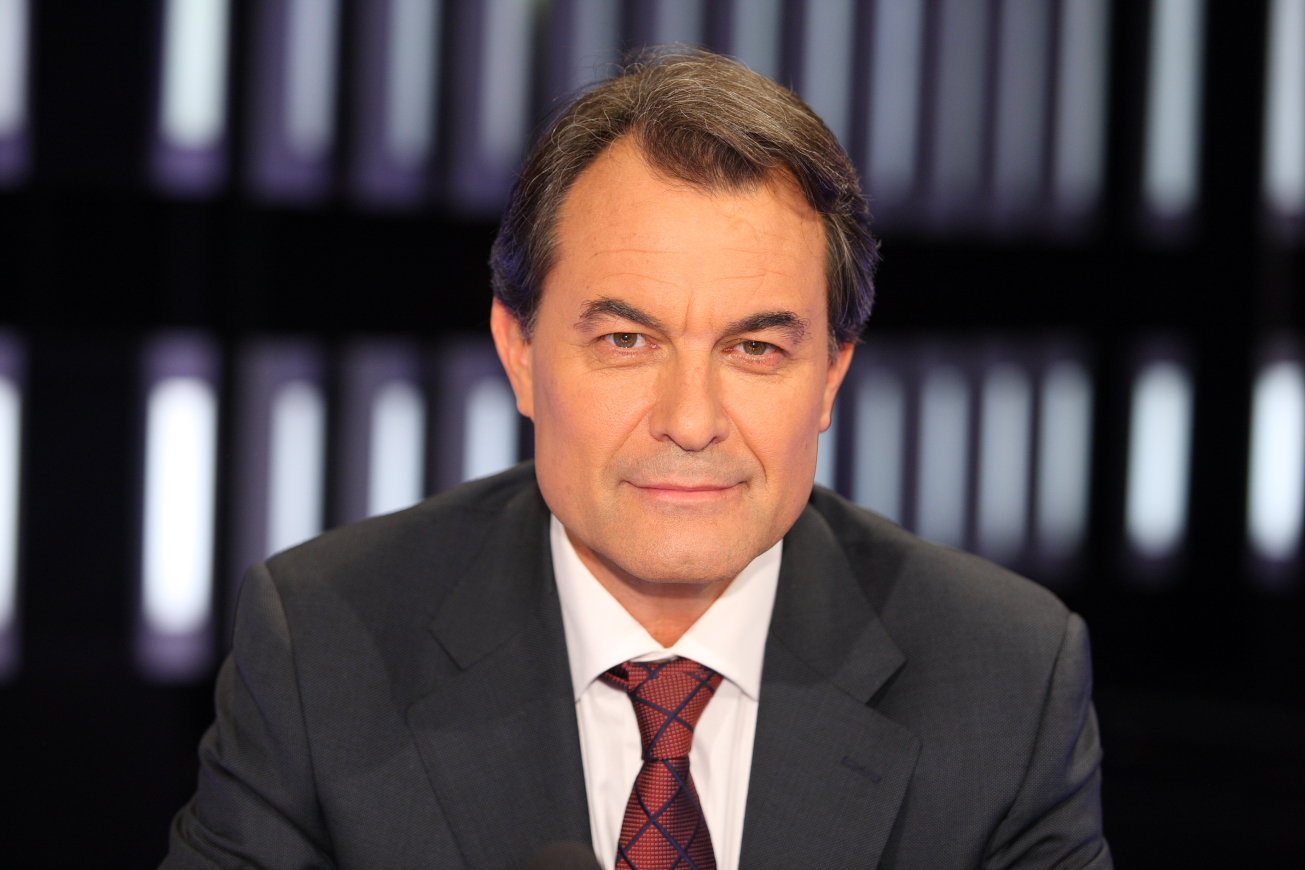 Artur Mas al programa 59 segons